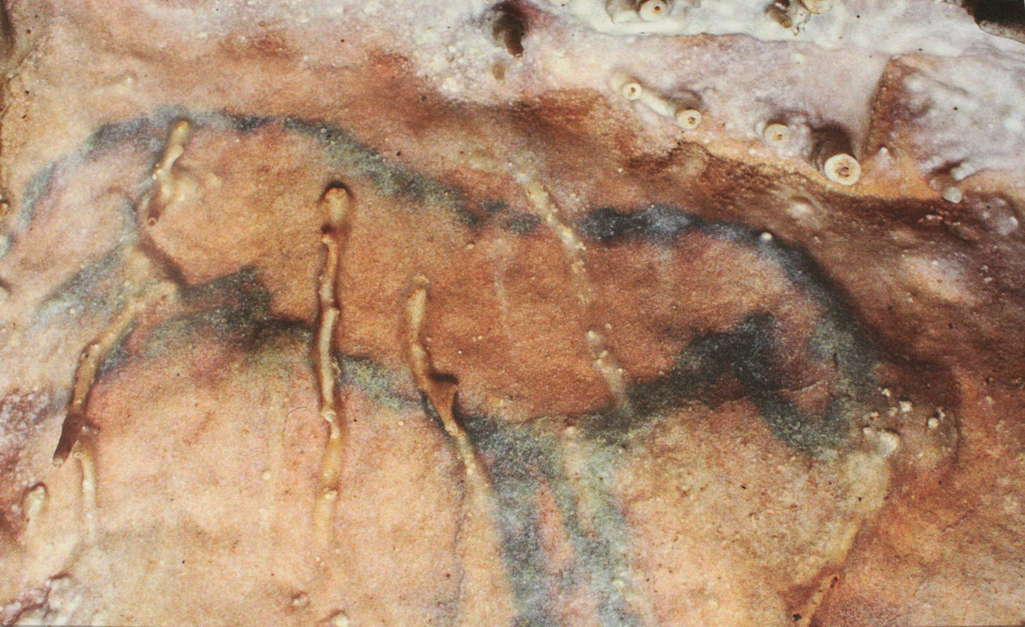 Grotte de Villars, ou grotte préhistorique du Cluzeau (Classement) .